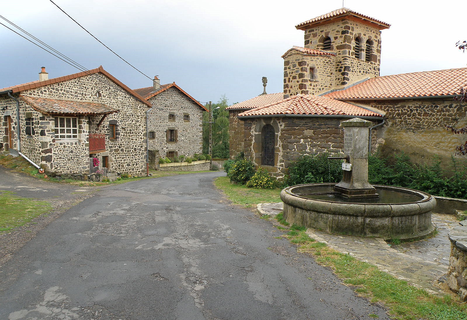 Saint-Geneys-près-Saint-Paulien, dép. de Haute-Loire, France (Auvergne). Église romane Saint-Barthélemy et maisons typiques.